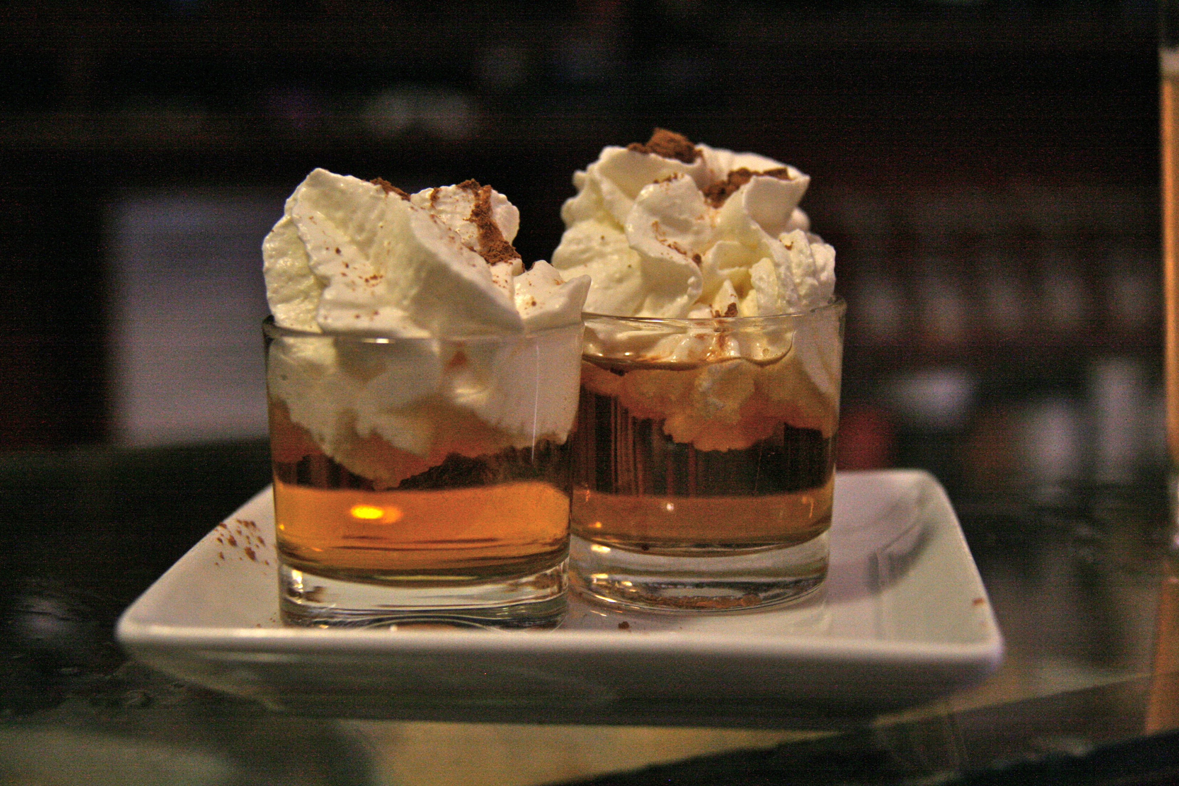 Chupito de ron al miel, cubierto de nata y canela